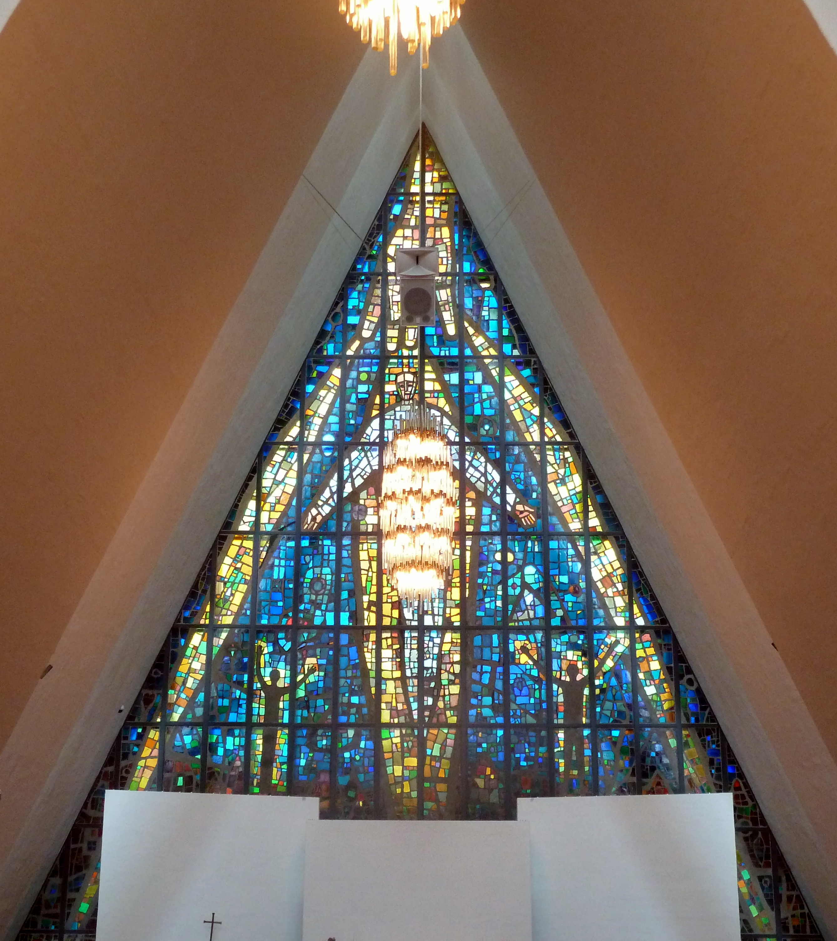 2010-08-02 - Tromsø - Fenster der Eismeerkathedrale